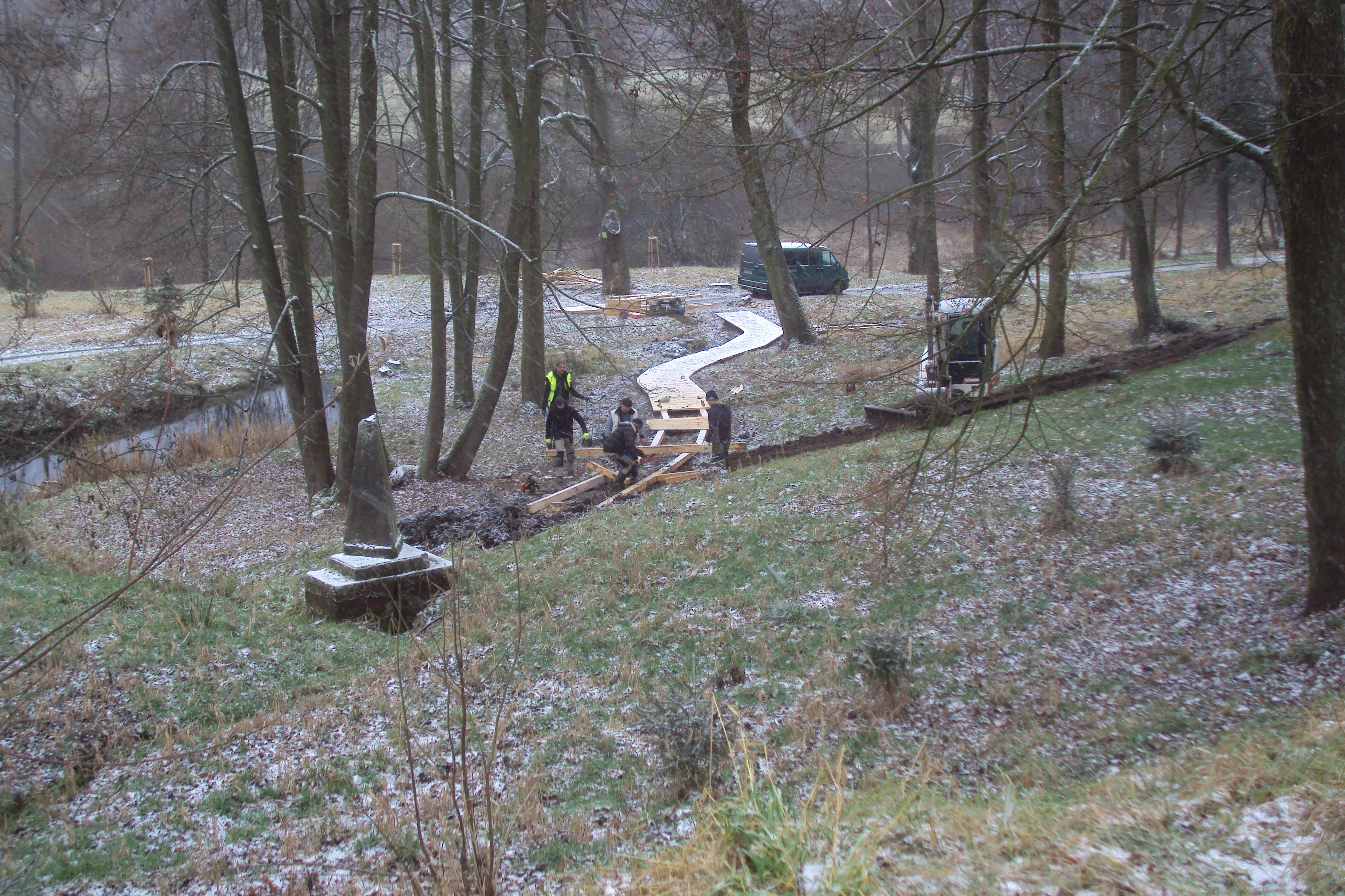 Budování chodníčků v parku Nové Zákupy